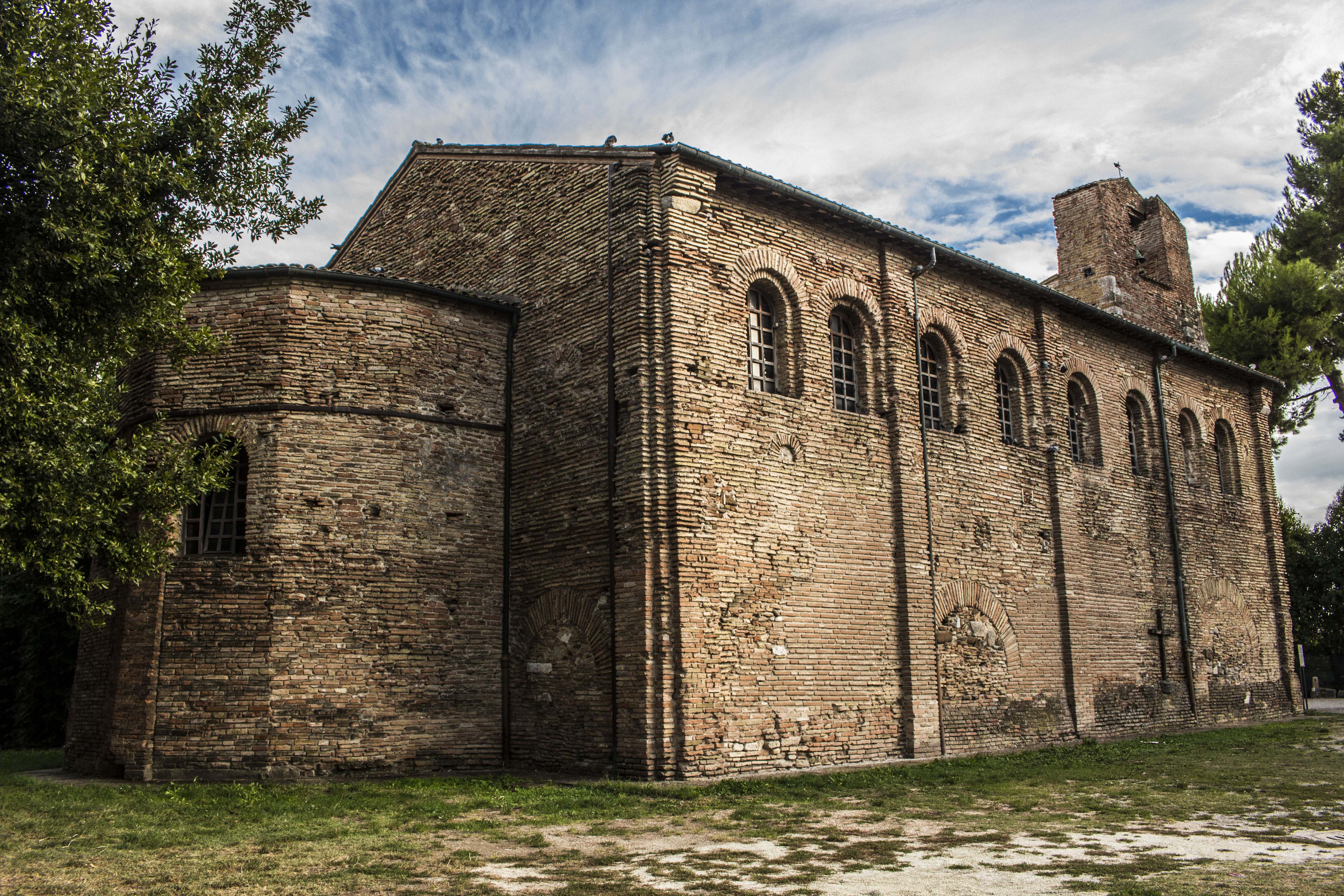 Pieve di S. Michele Arcangelo This is a photo of a monument which is part of cultural heritage of Italy.